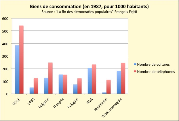 Graphique donnant pour l'ensemble de l'OCDE et les pays de l'Est les niveaux d'équipement en voitures et en téléphones en 1987